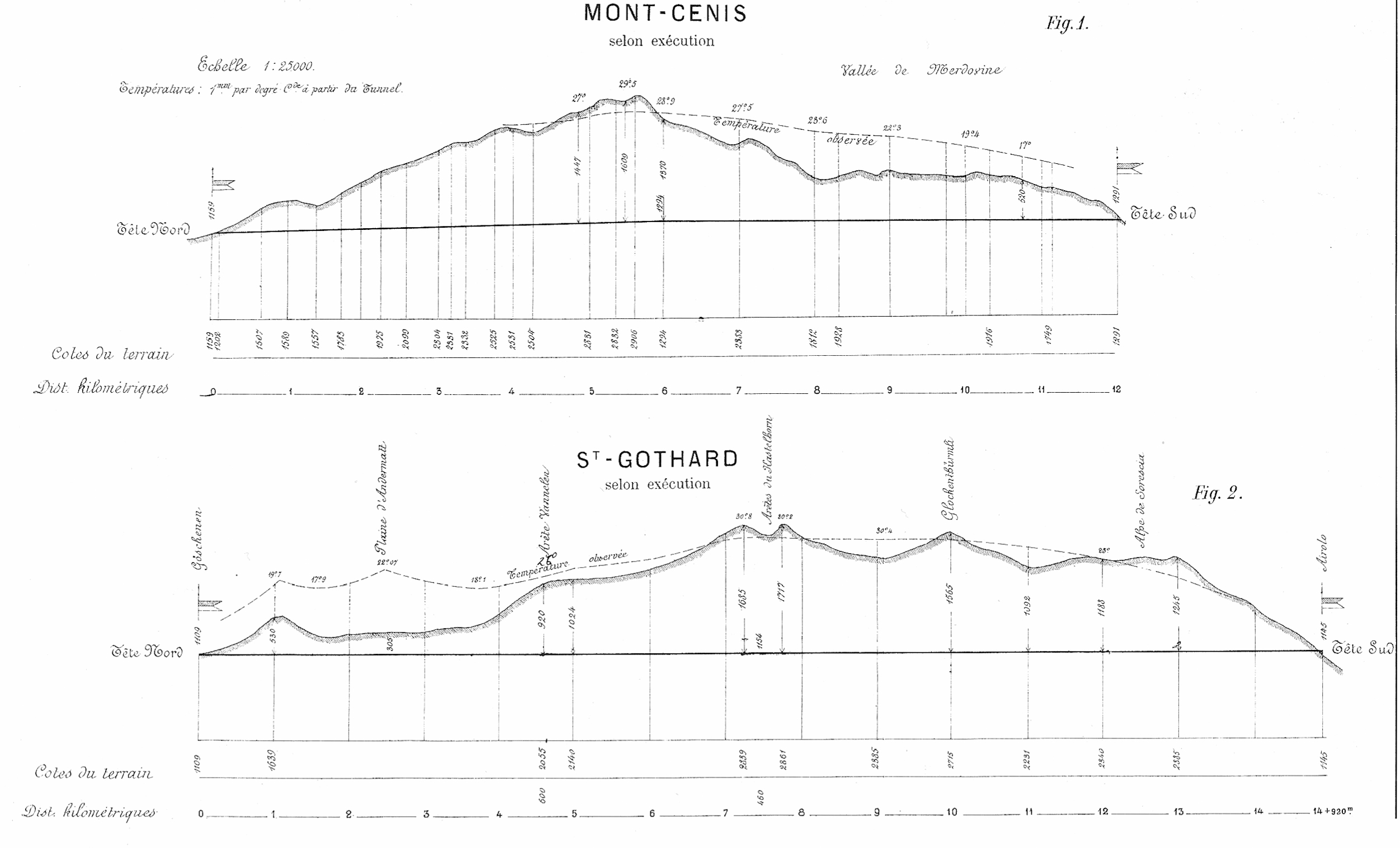 Die Lufttemperatur in langen Bahntunnels (Mont-Cenis und St. Gotthard), Aufzeichnungen von Oberingenieur Stockalper aus dem Jahre 1883